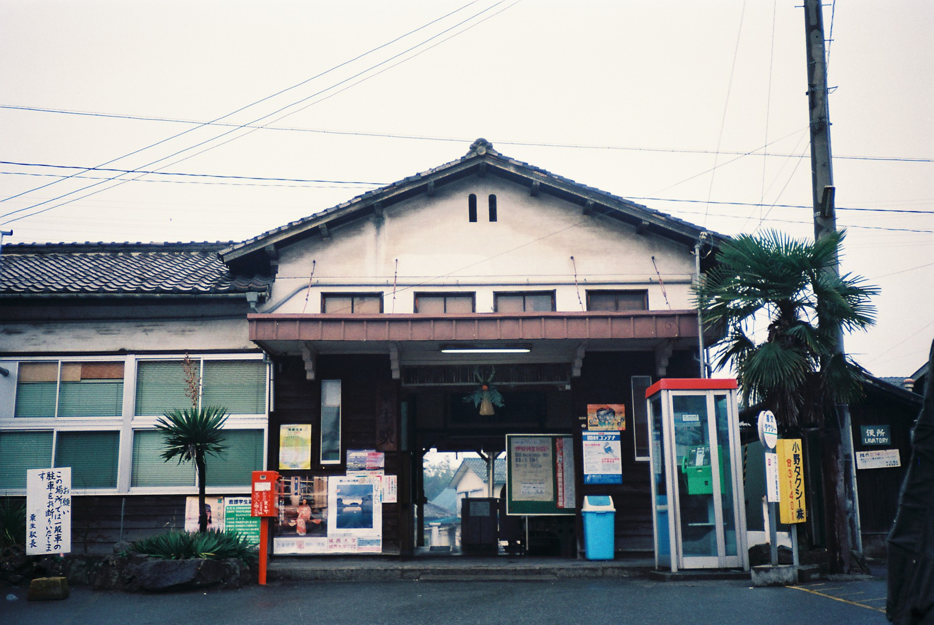 粟生駅旧駅舎（1986年12月31日撮影）